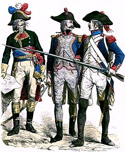 Richard Knötel (1857–1914): Französische Uniformen, 1795. Von links: General, Offizier der leichten Infanterie, Soldat der Linieninfanterie.